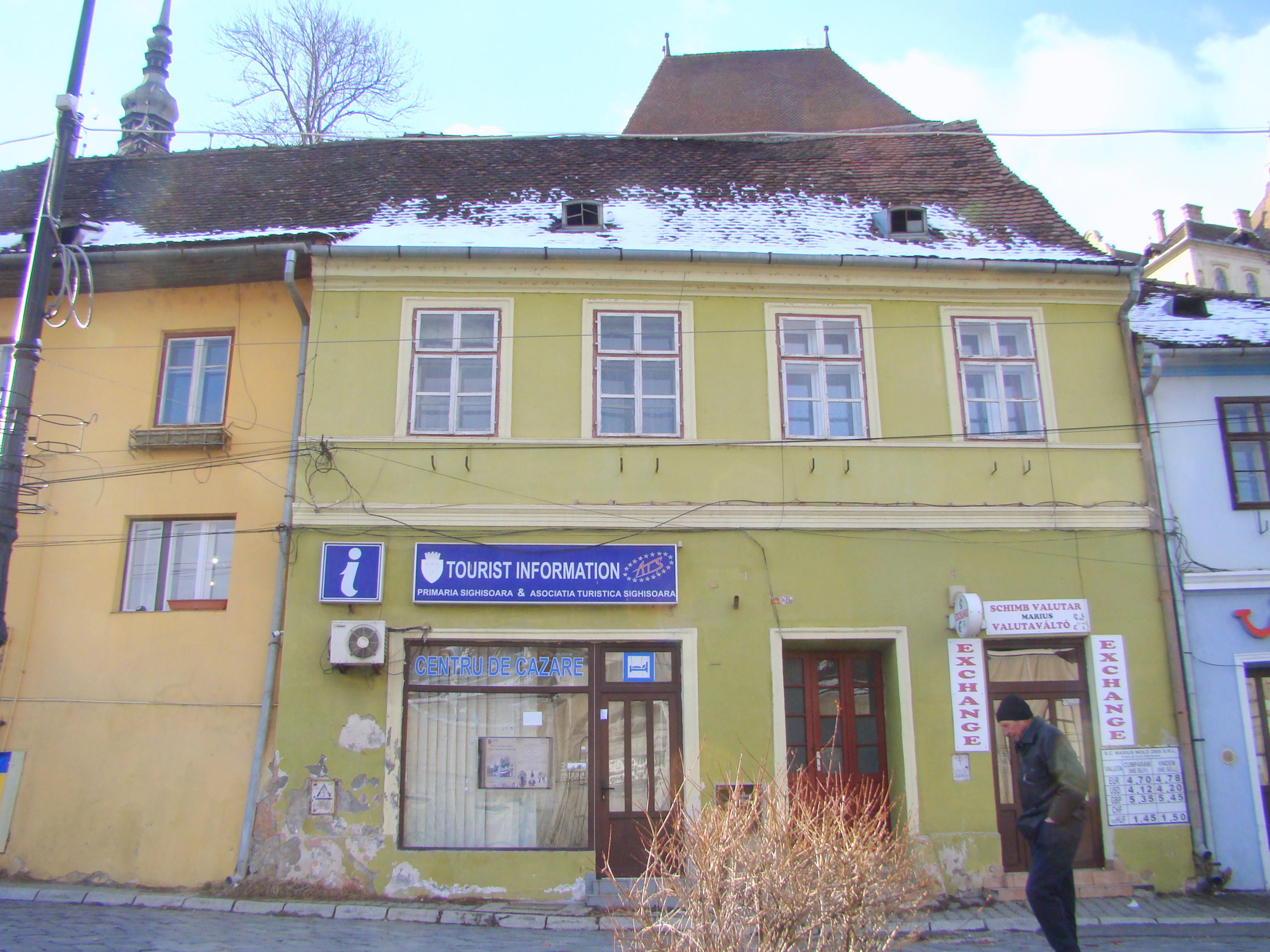 Casă, municipiul Sighișoara, Piața Goga Octavian 8 sec. XVIII, sec. XX